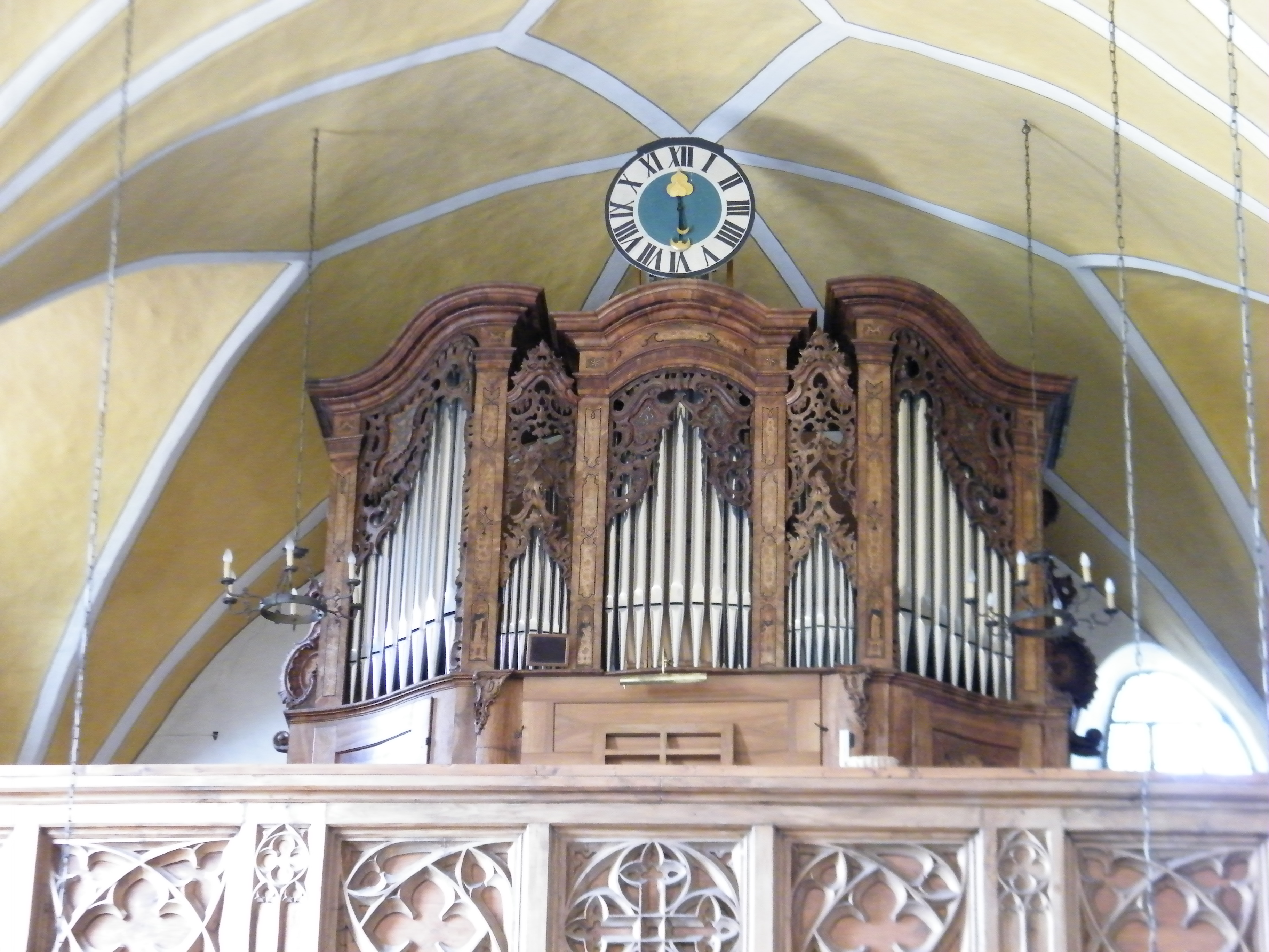 Deitsch: Eisenbarth-Orgel Aich (ursprünglich Schweinacher-Orgel Kloster Seligenthal)